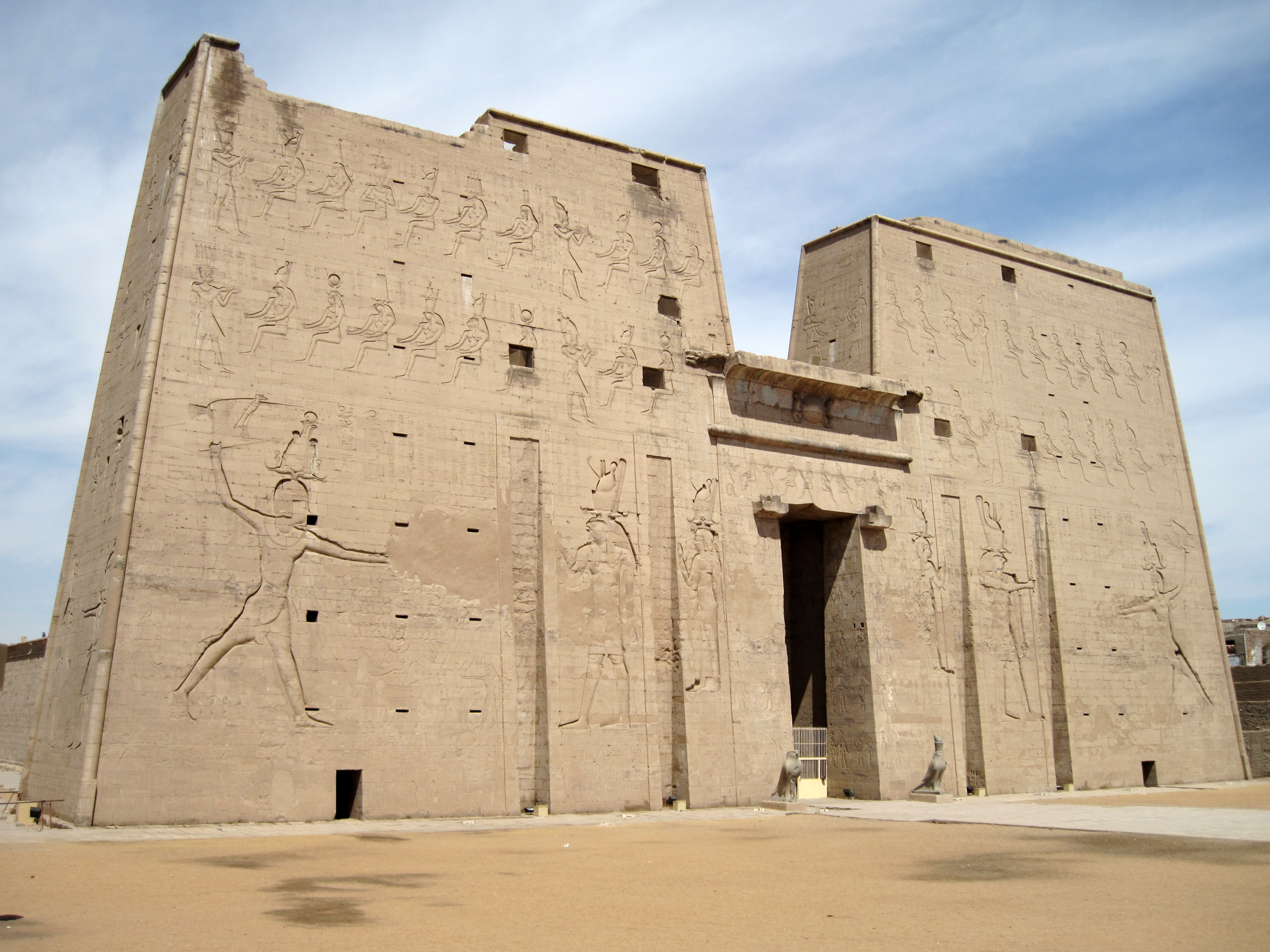 Pylon des Tempels von Edfu, Ägypten